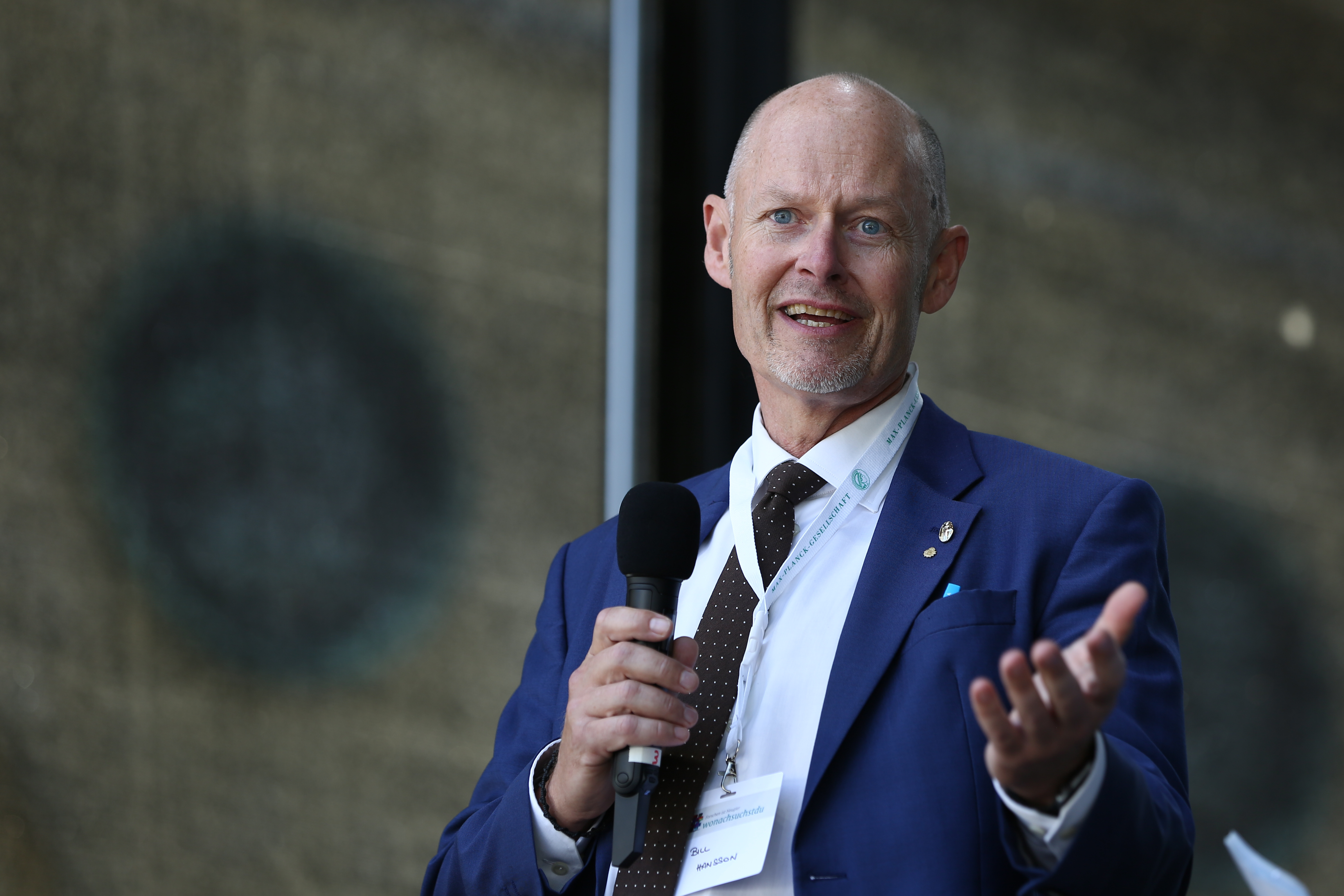 Bill Hansson, Vize-Präsident der Max-Plack-Gesellschaft am Max-Plack-Tag in München, 2018-09-14